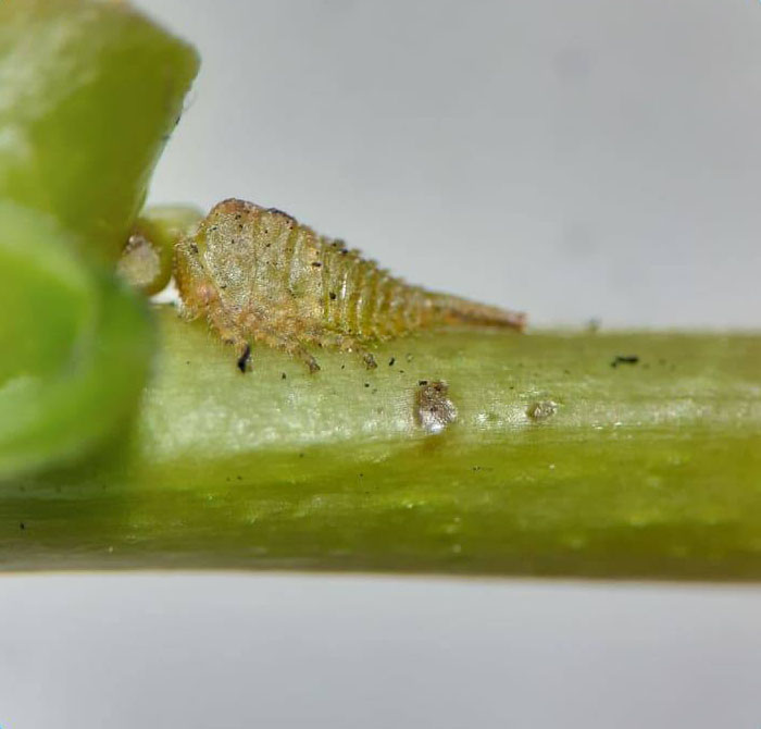 中文（台灣）: 此為在披針葉饅頭果上的角蟬，利用顯微鏡觀察拍下的照片